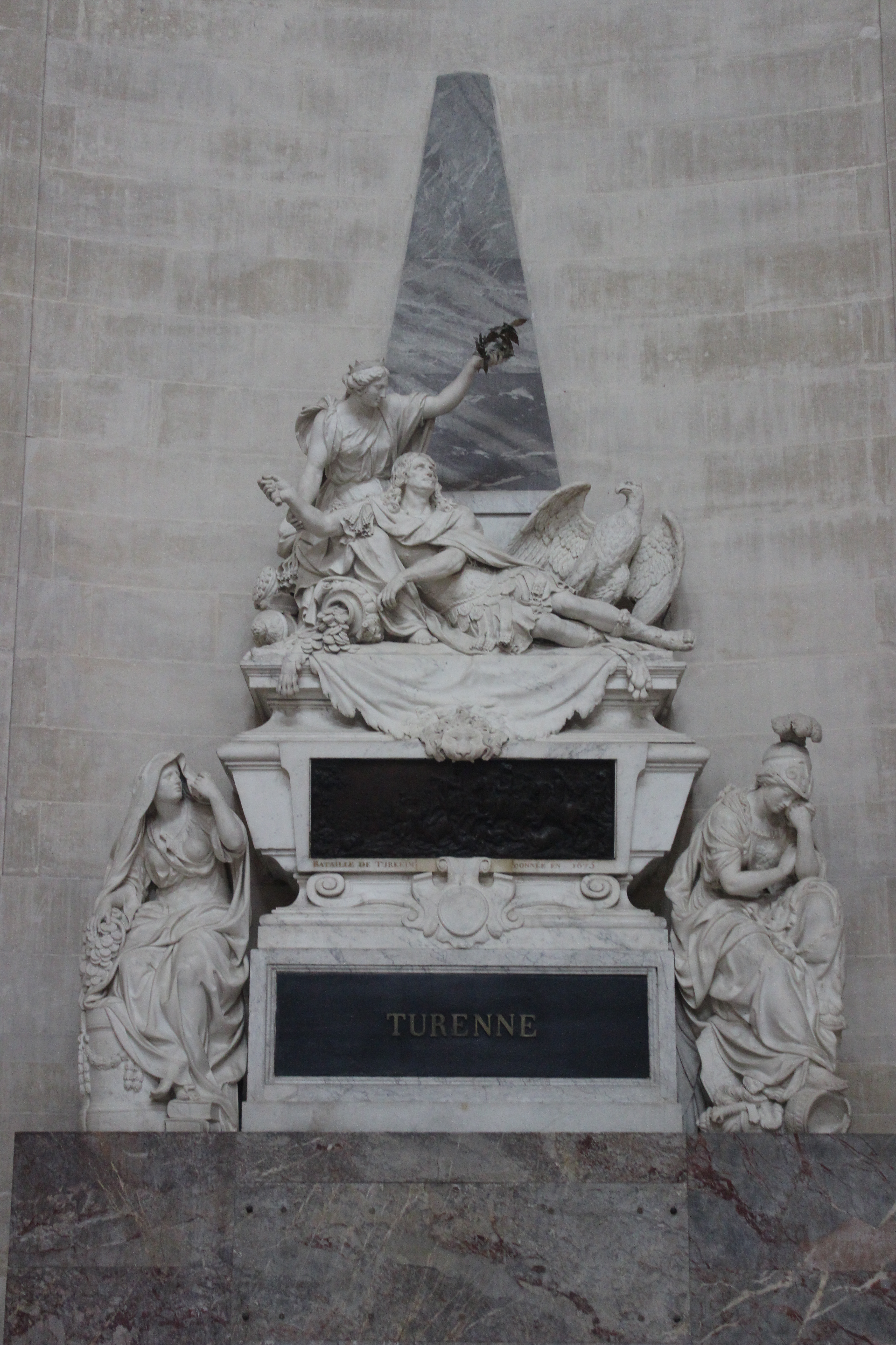 París, Invalides, tumba del mariscal de Turena.